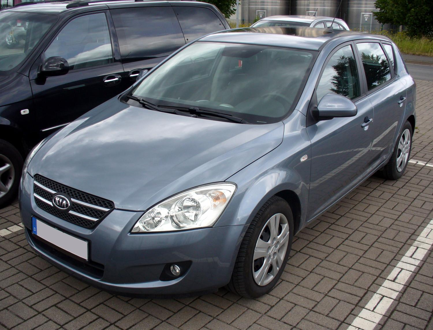 Kia cee'd